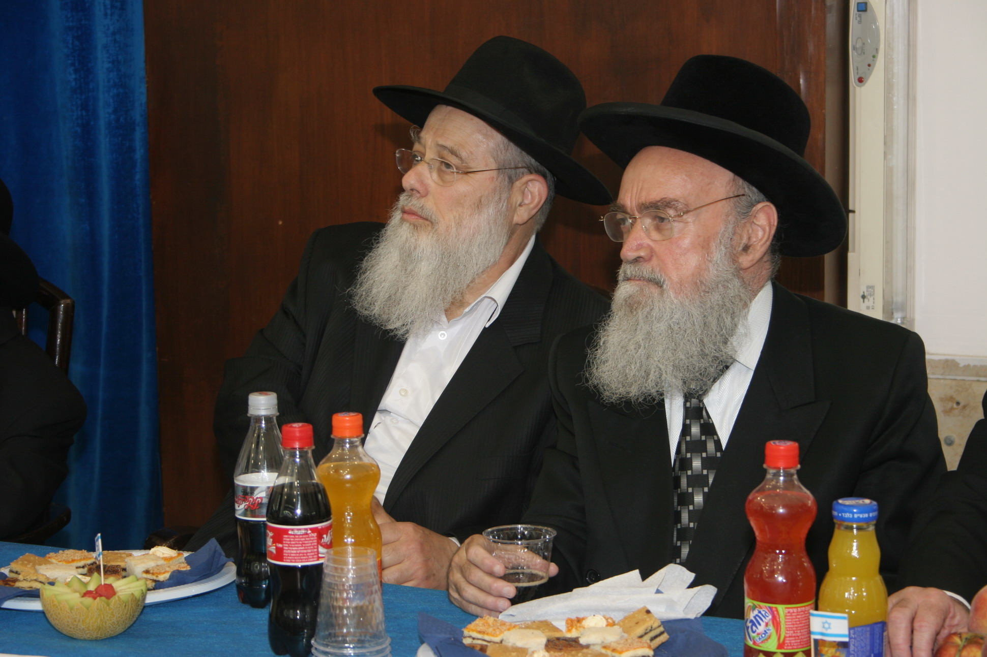 ישיבת מרכז הרב.